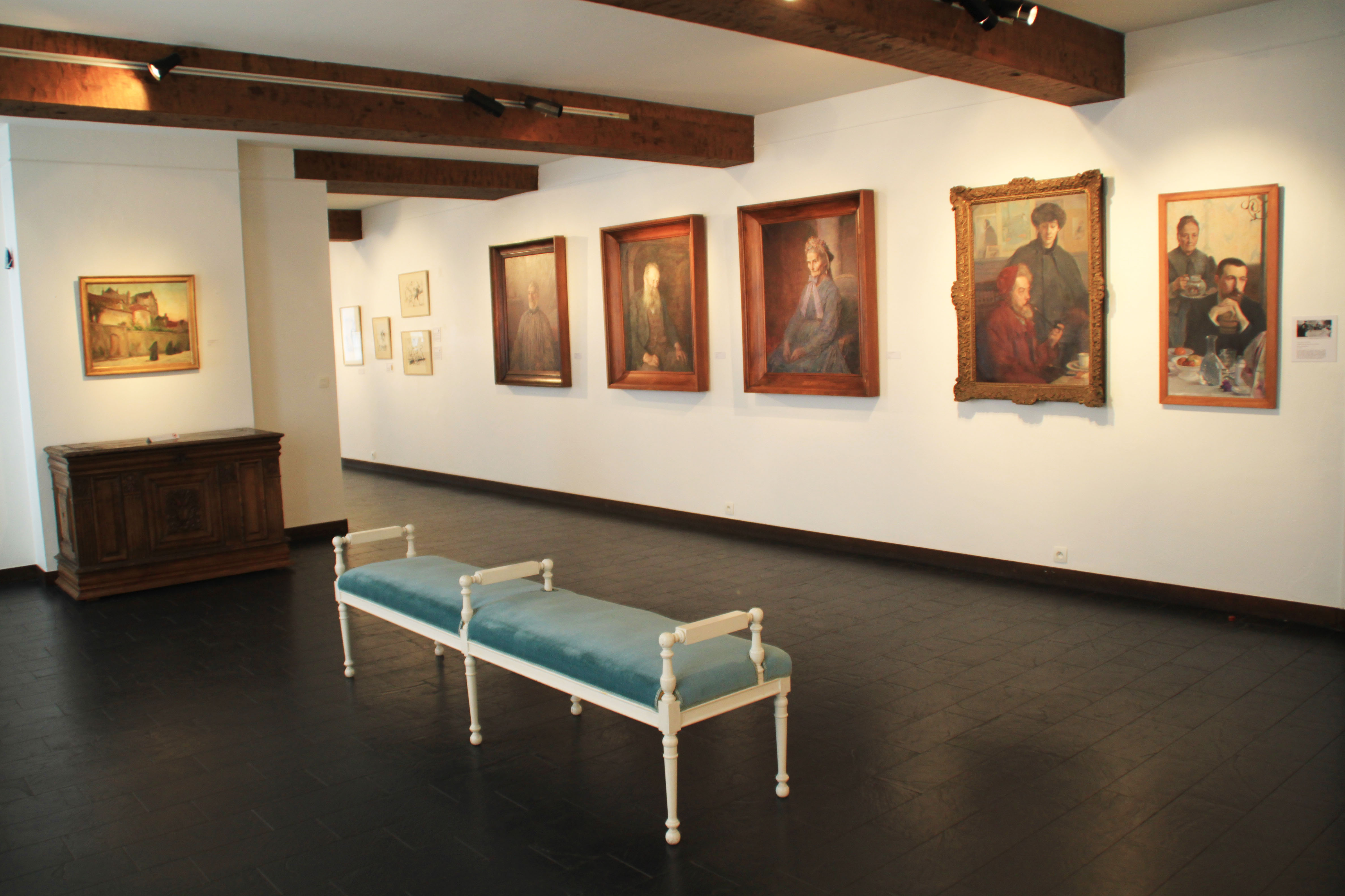 Une des salles consacrées à Charles Léandre au Musée municipal de Vire